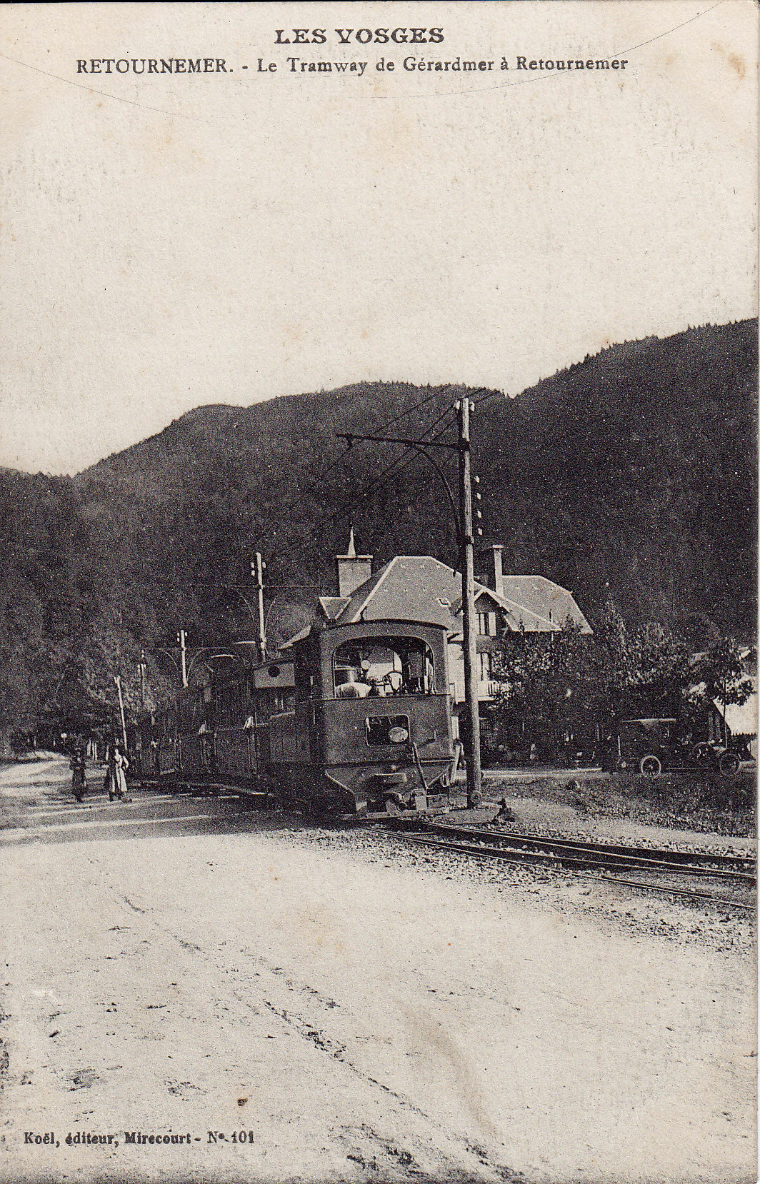 Carte postale ancienne éditée par Koël à Mirecourt, collection Les Vosges, n°101 : RETOURNEMER - Le tramway de Gérardmer à Retournemer